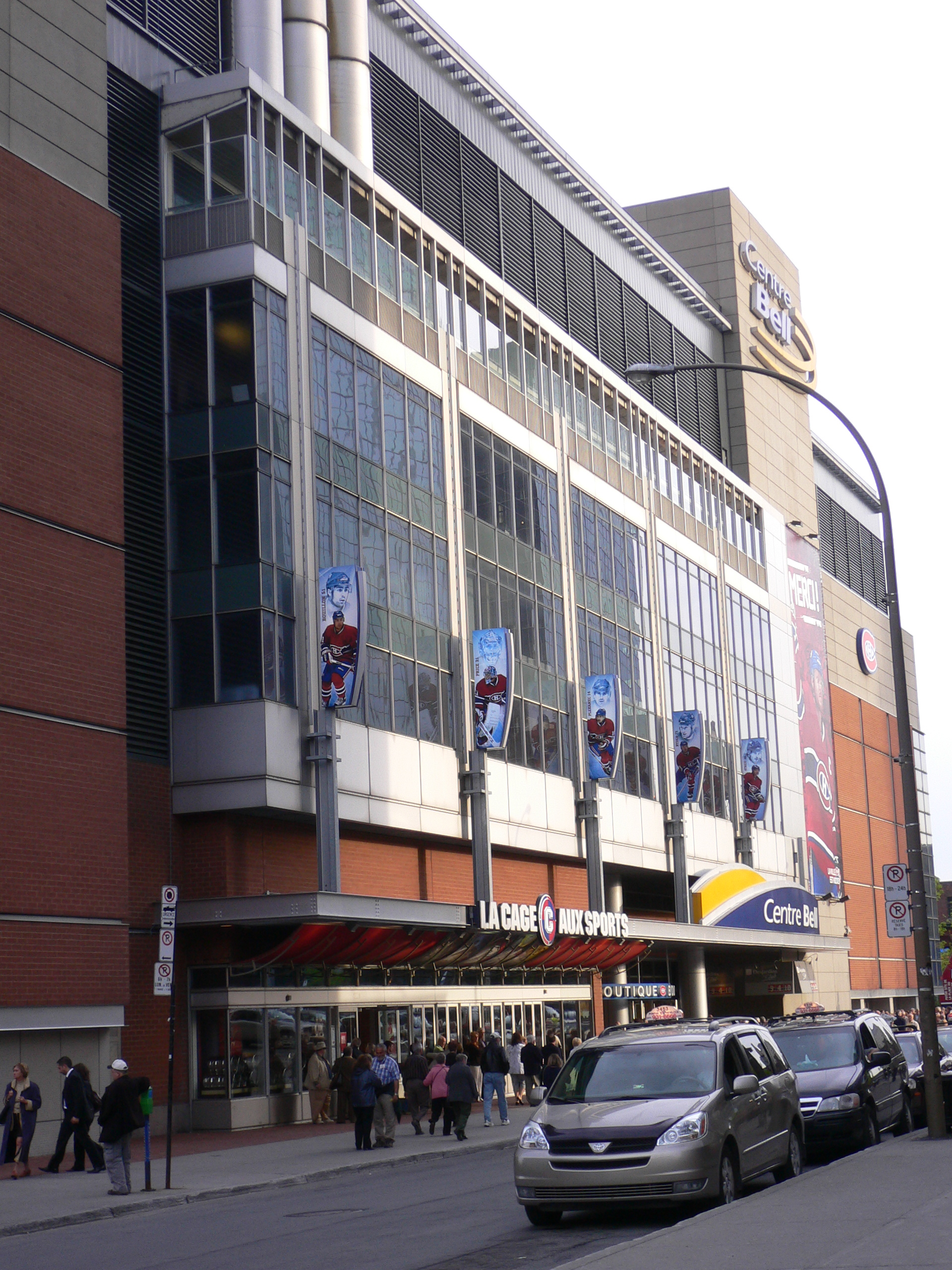 Montreal Canadiens Arena